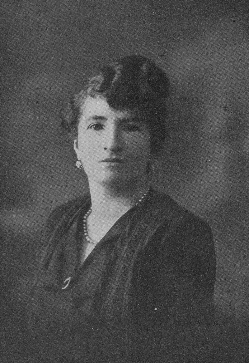 Carmela Ayr, maggio 1920.